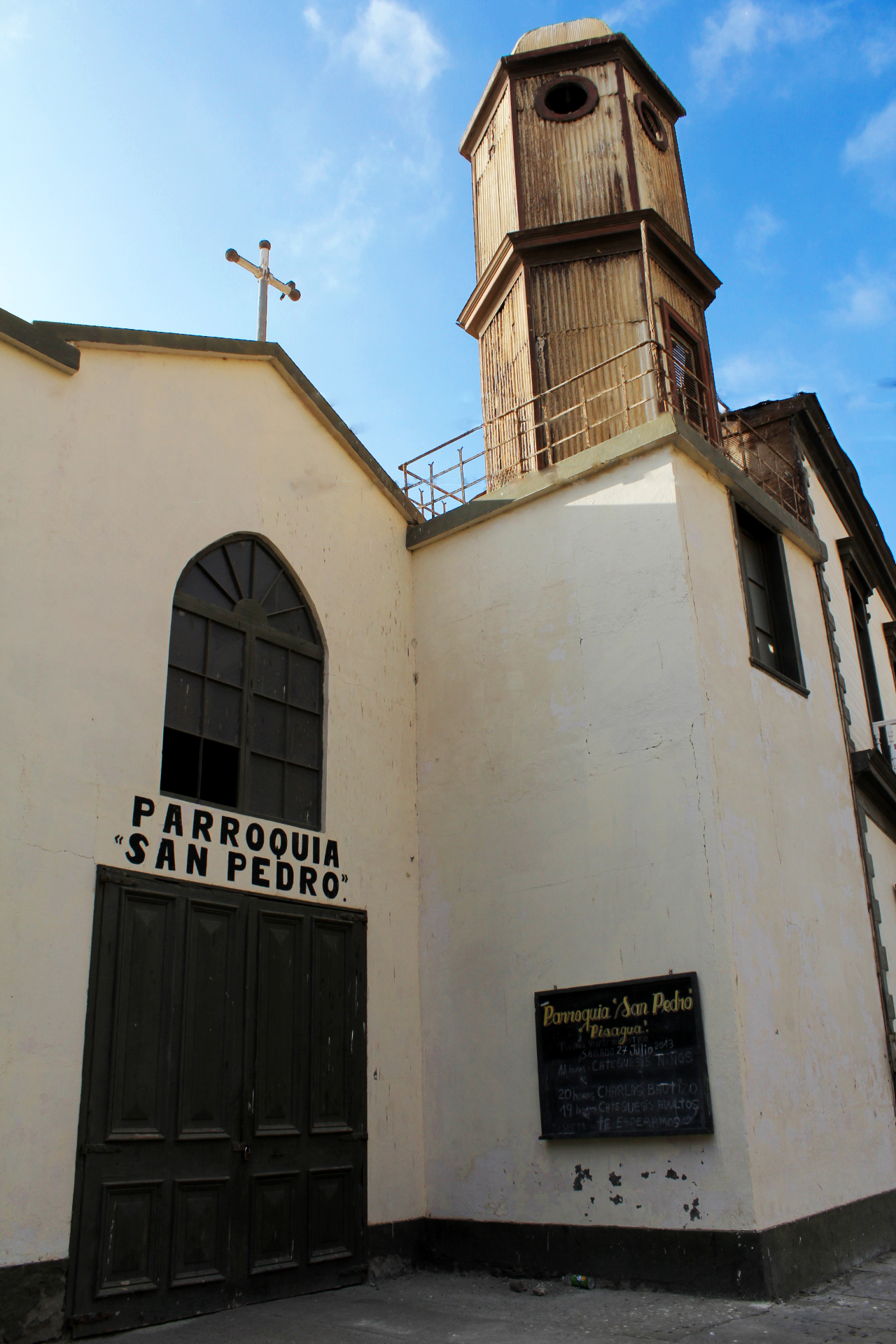 Iglesia de Pisagua - Parroquia San Pedro This is a photo of a national monument in Chile: 285